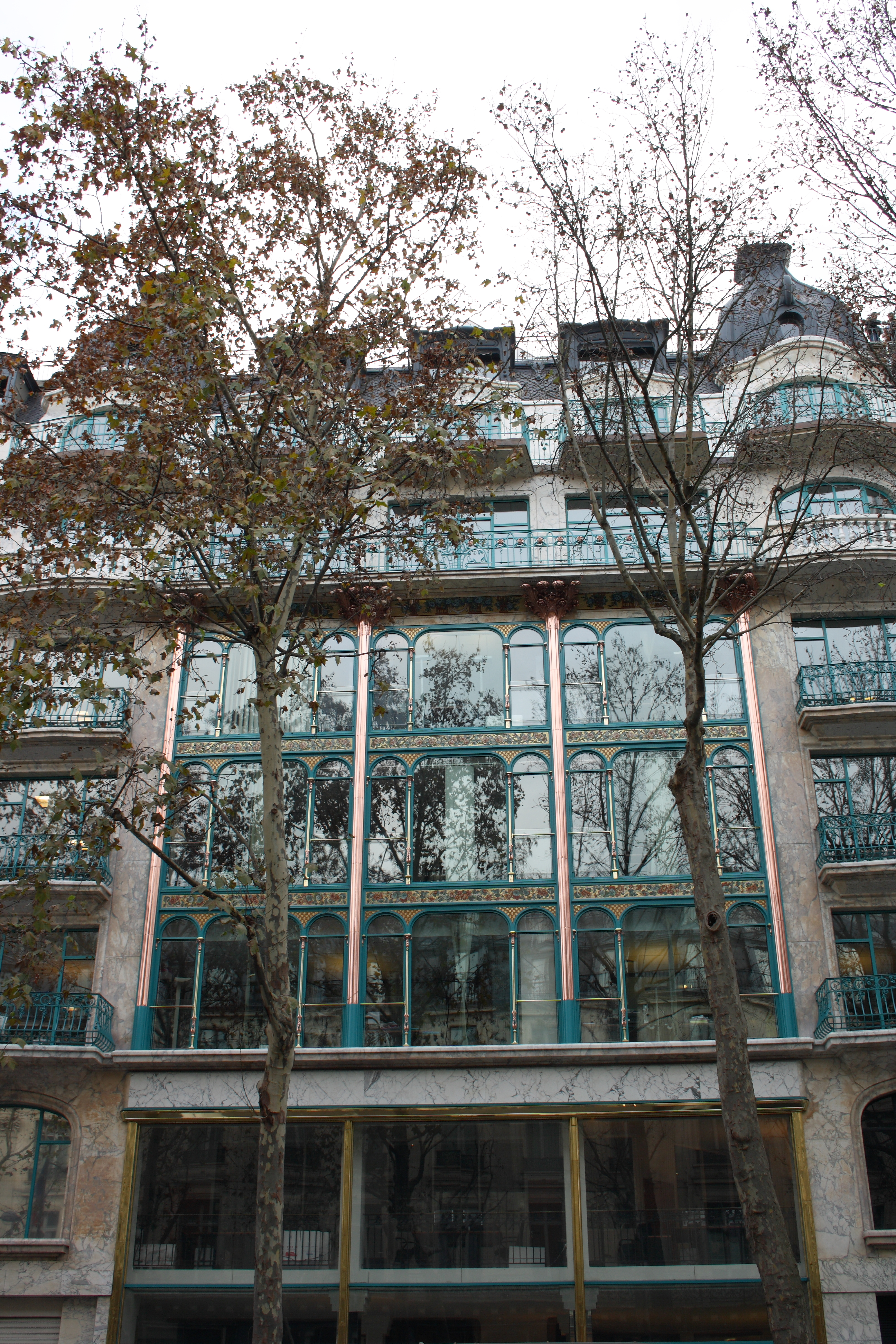 Ehemaliges Kaufhaus La Samaritaine de Luxe, 27, boulevard des Capucines im 2. Arrondissement von Paris, 1914-1917 von Frantz Jourdain und Georges Bourneuf errichtet